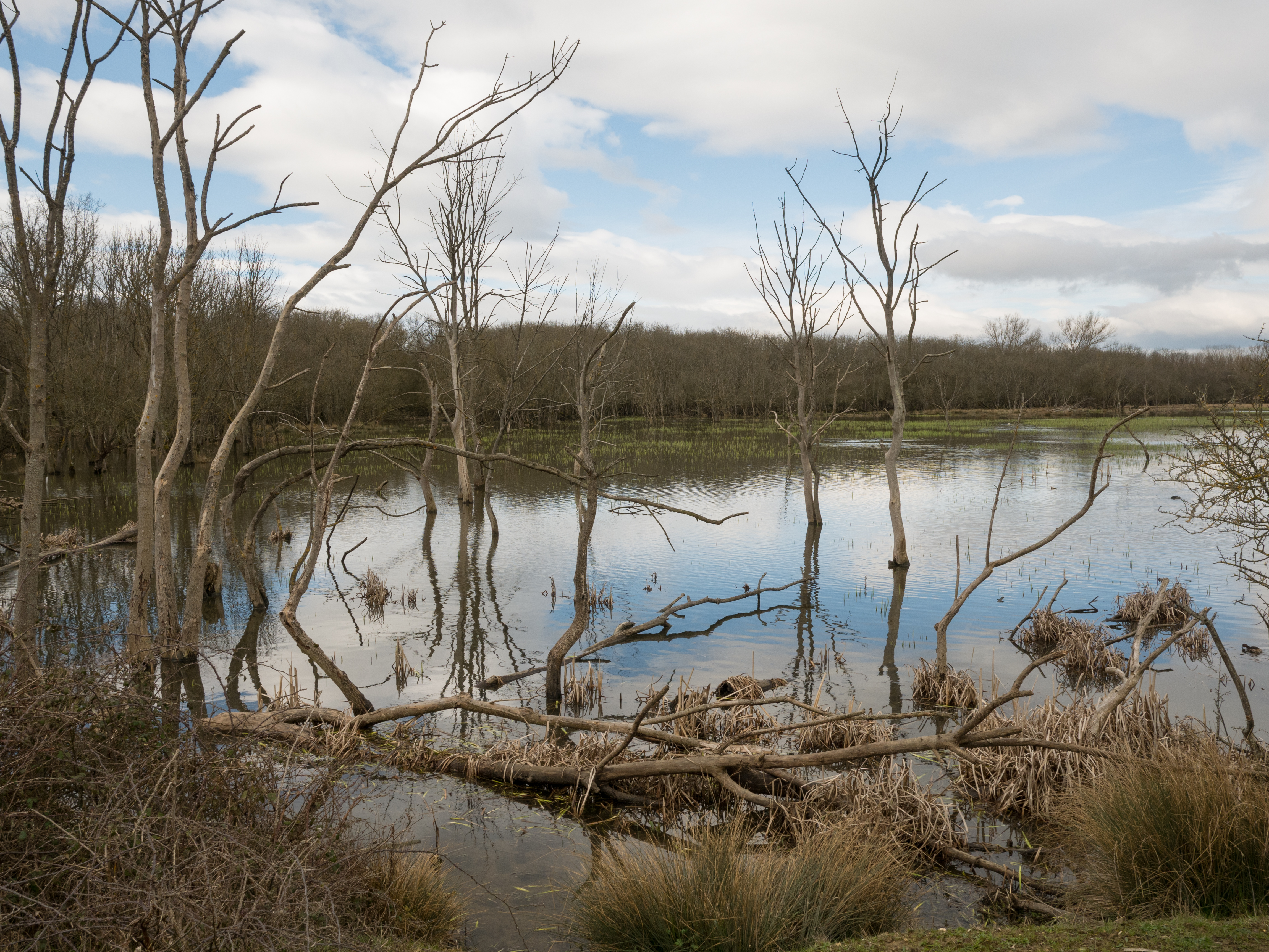 Húmedal de Salburúa en invierno. Vitoria-Gasteiz, País Vasco, España This is a photography of a Special Area of Conservation in Spain with the ID: ES2110014. Natura2000 entry, EEA entry